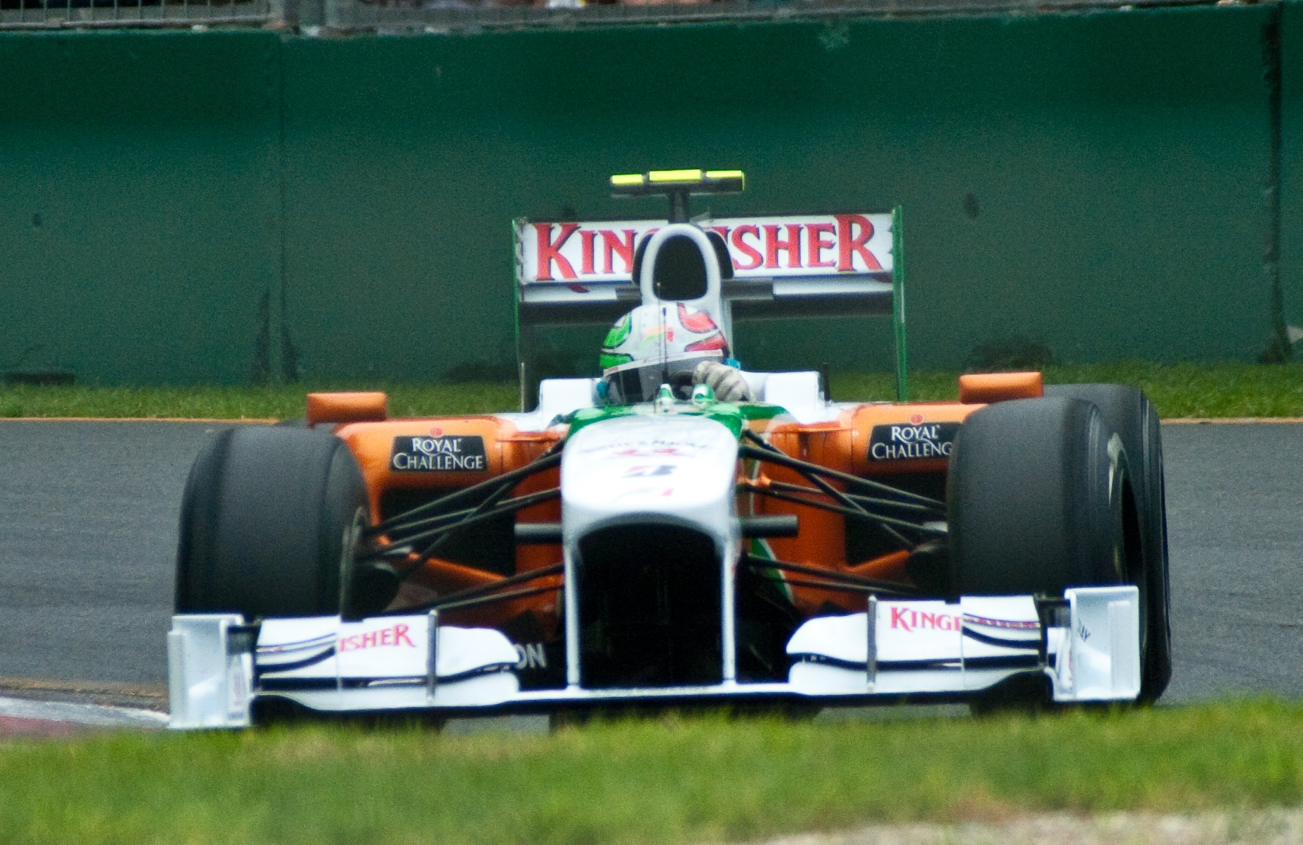 Liuzzi in Melbourne